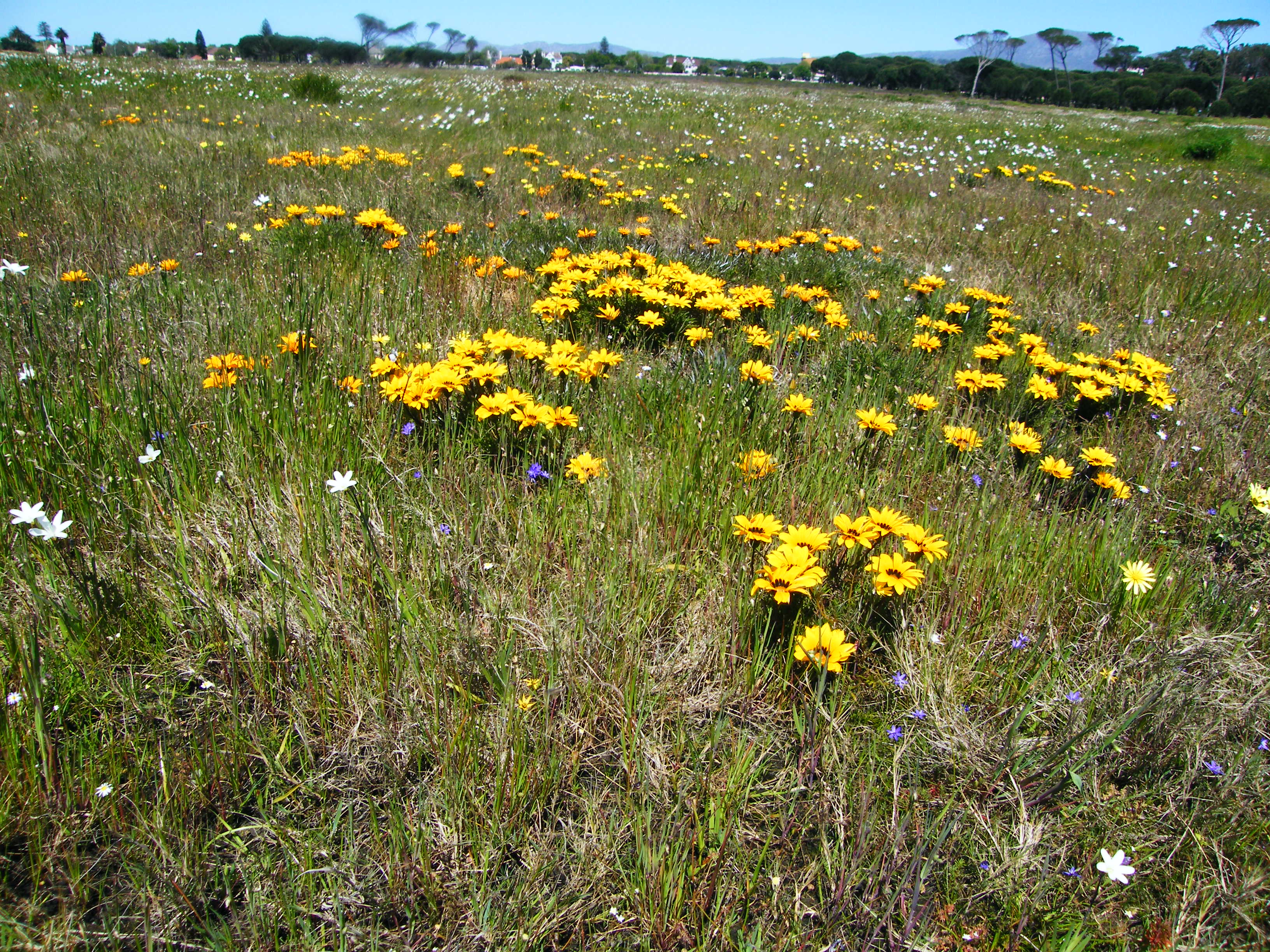 Botterblom